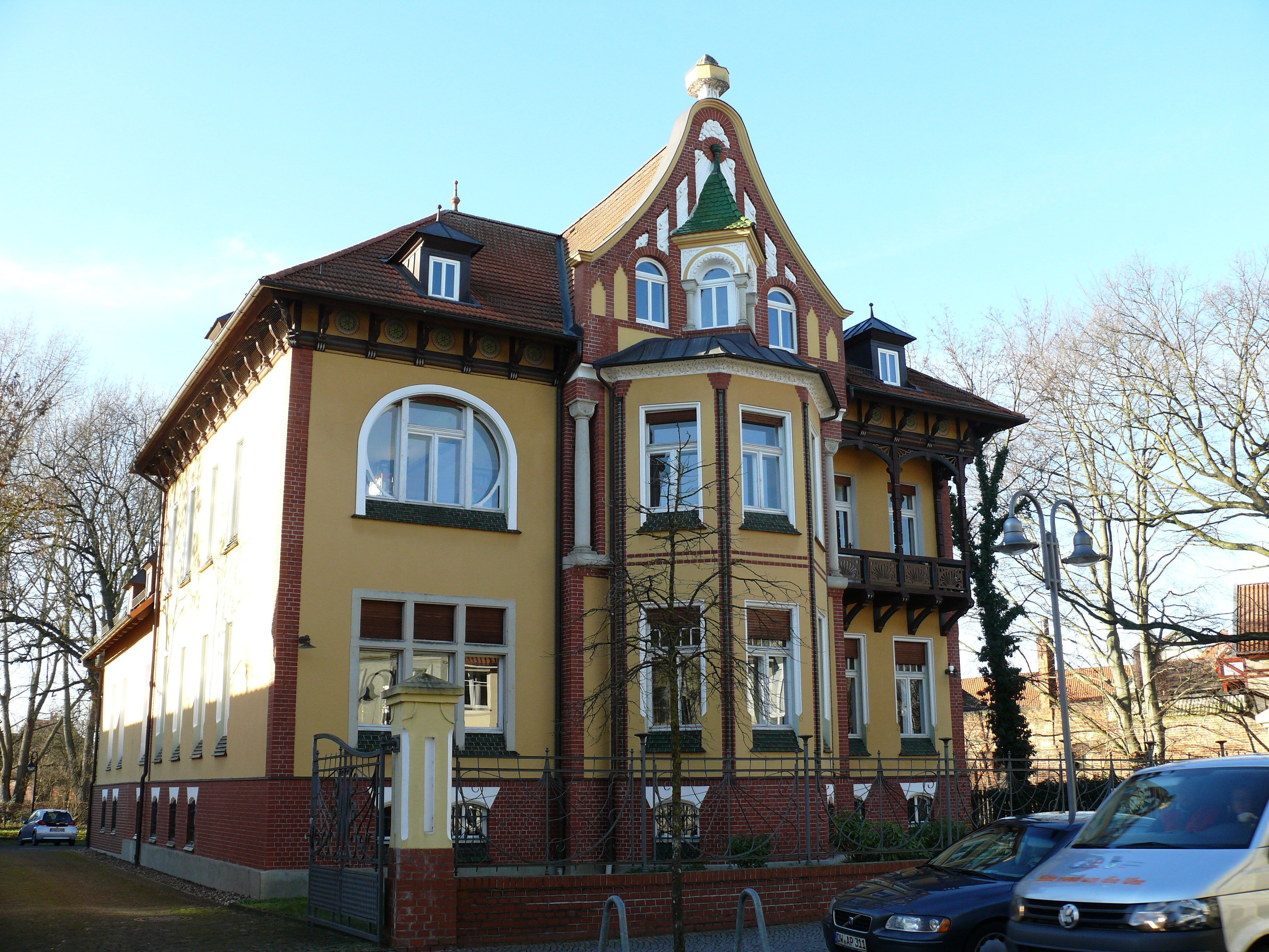 Die ehemalige Freydancksche Villa, heute Stadt- und Kreisbibliothek der Hansestadt Salzwedel.